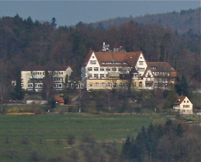 Elisabethenberg, Waldhausen (Lorch), 2009